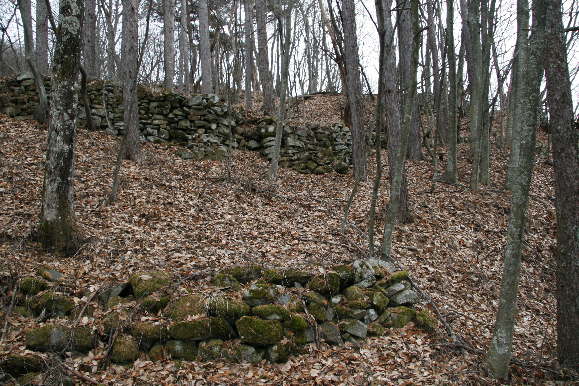 桐原城の石垣